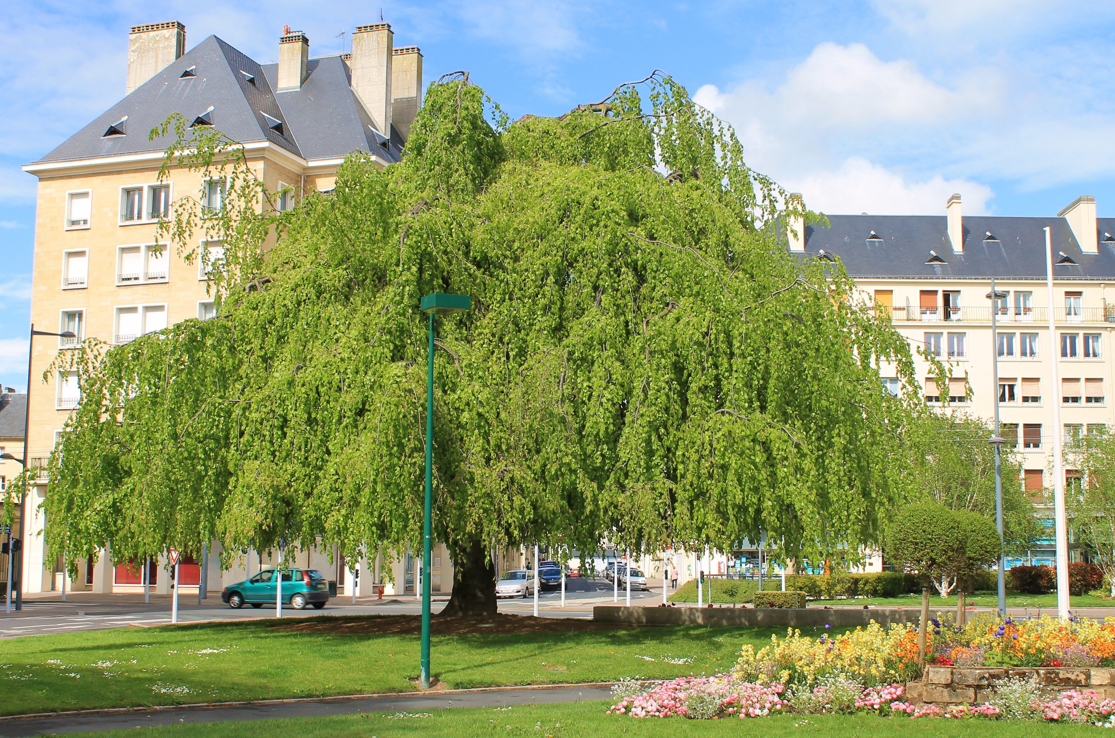 Hêtre pleureur planté en 1910 place de la Résistance, square Jean Soreth près du chevet de l'église Saint-Jean à Caen (Calvados)